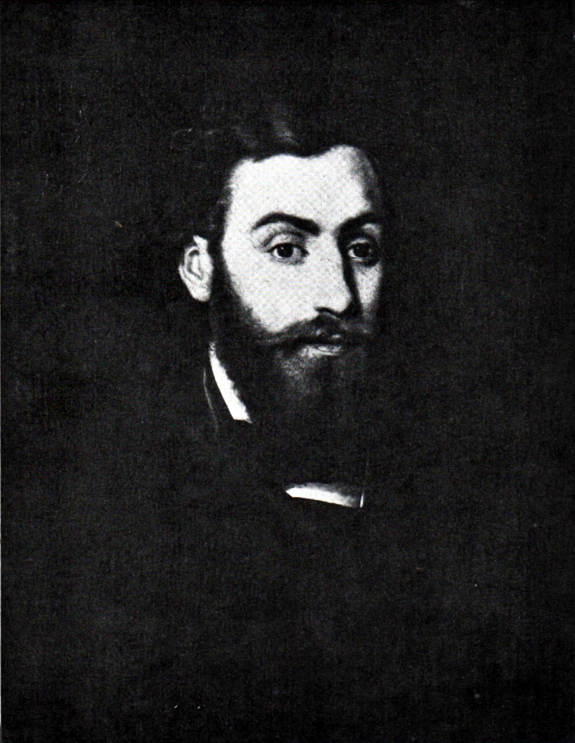 Portretul lui Ion Arcescu pictat la Roma, ulei/pânză, 0,61x0,46m - Muzeul Național de Artă al României